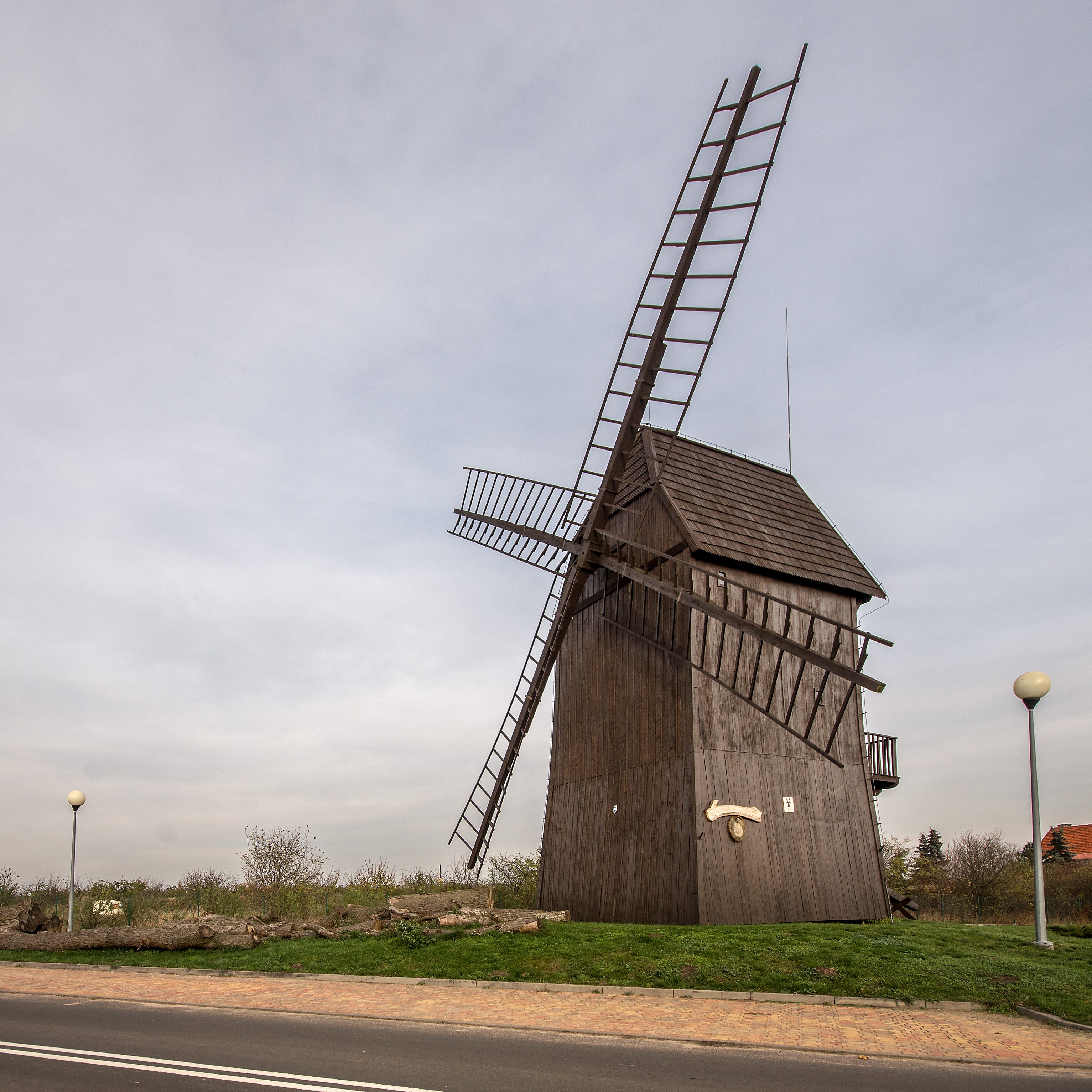 Krzywiń, wiatrak koźlak, 1803, pocz. XX